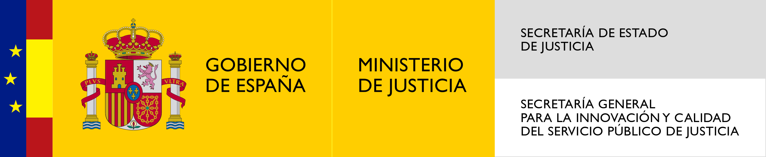 Logotipo de la Secretaría General de la Administración de Justicia